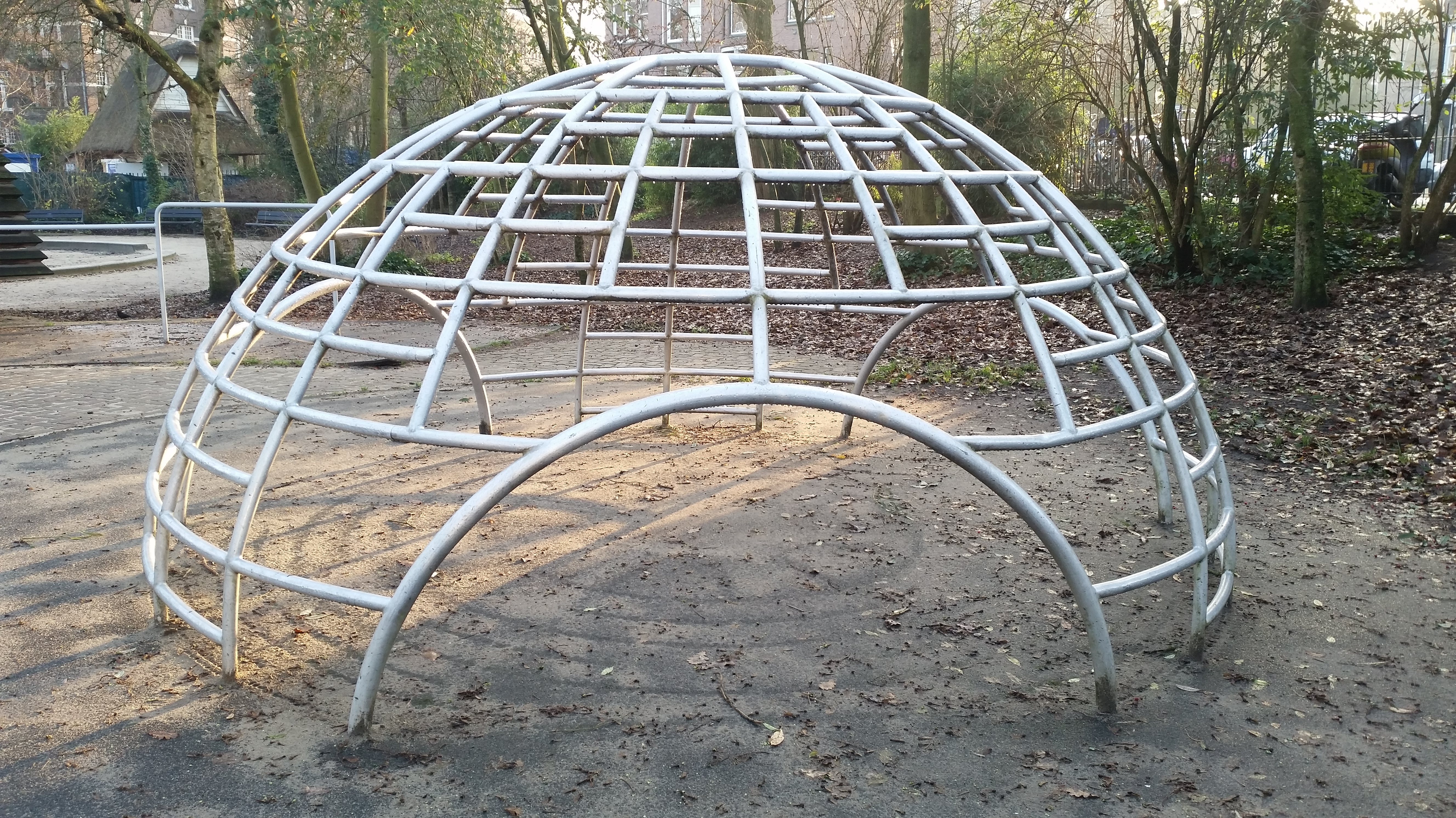 Iglo/klimkoepel op speelplaats